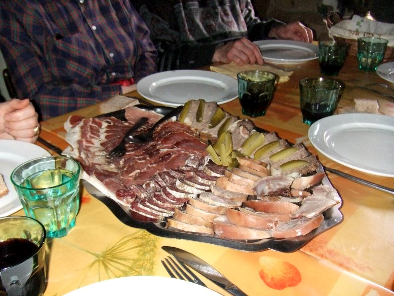 Buron de La Thuilière, refuge à Pailherols.